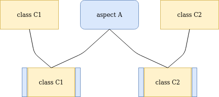 نحوه کار بافنده